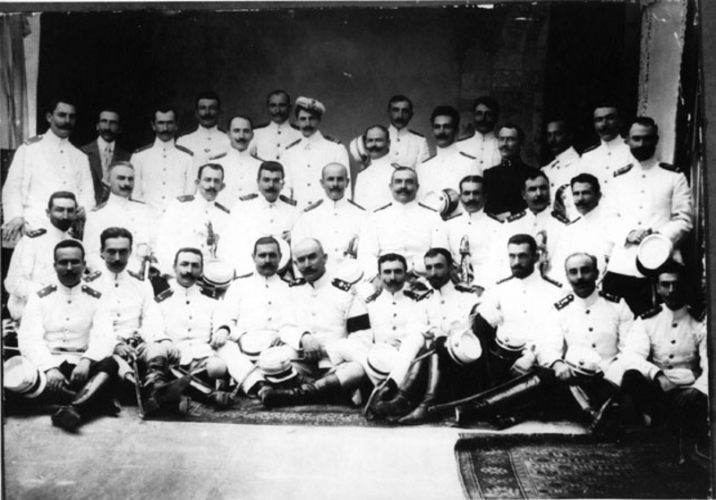 Гръцки офицери, участвали в Гръцката въоръжена пропаганда в Македония.